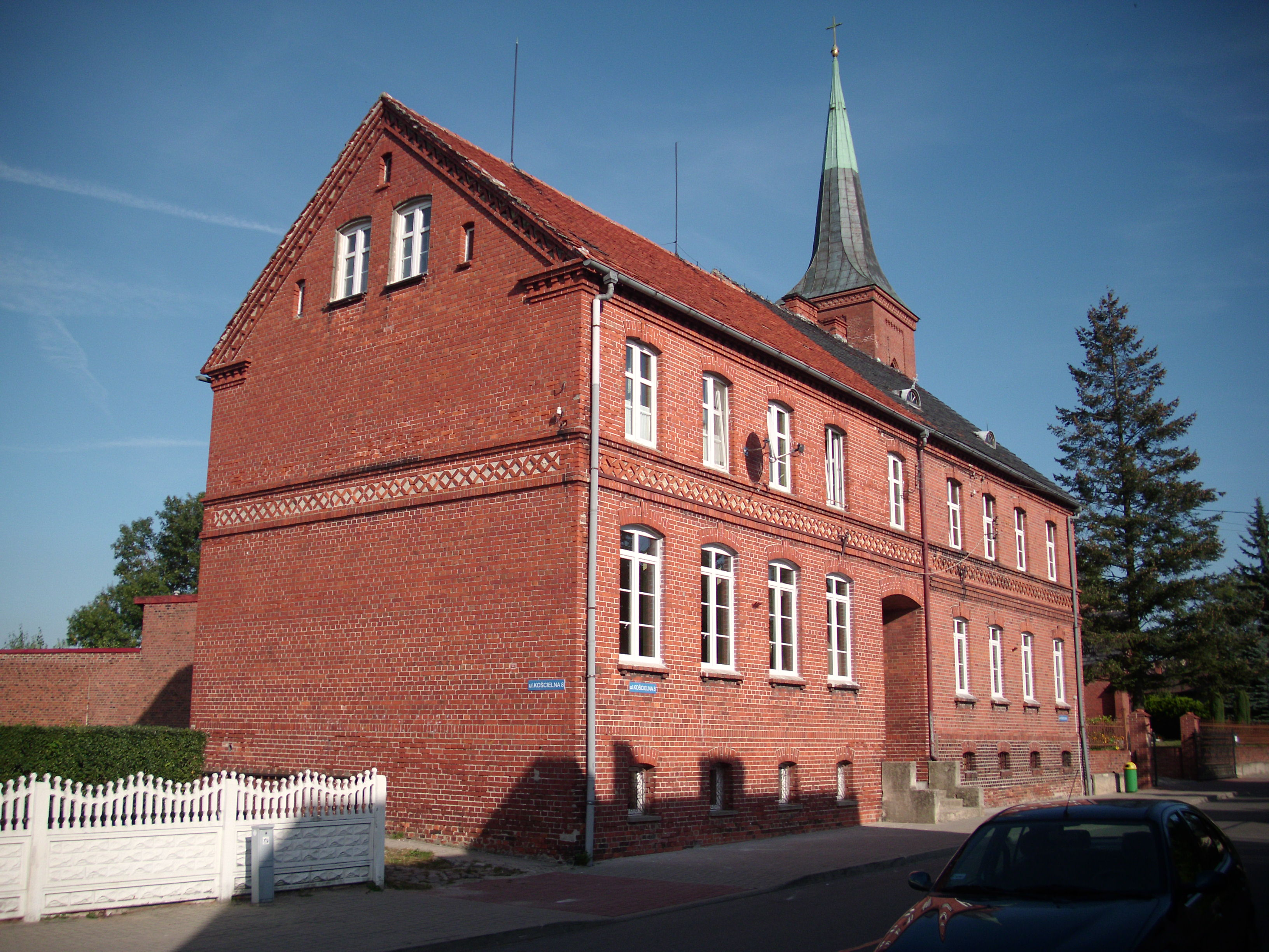 Międzybórz - plebania